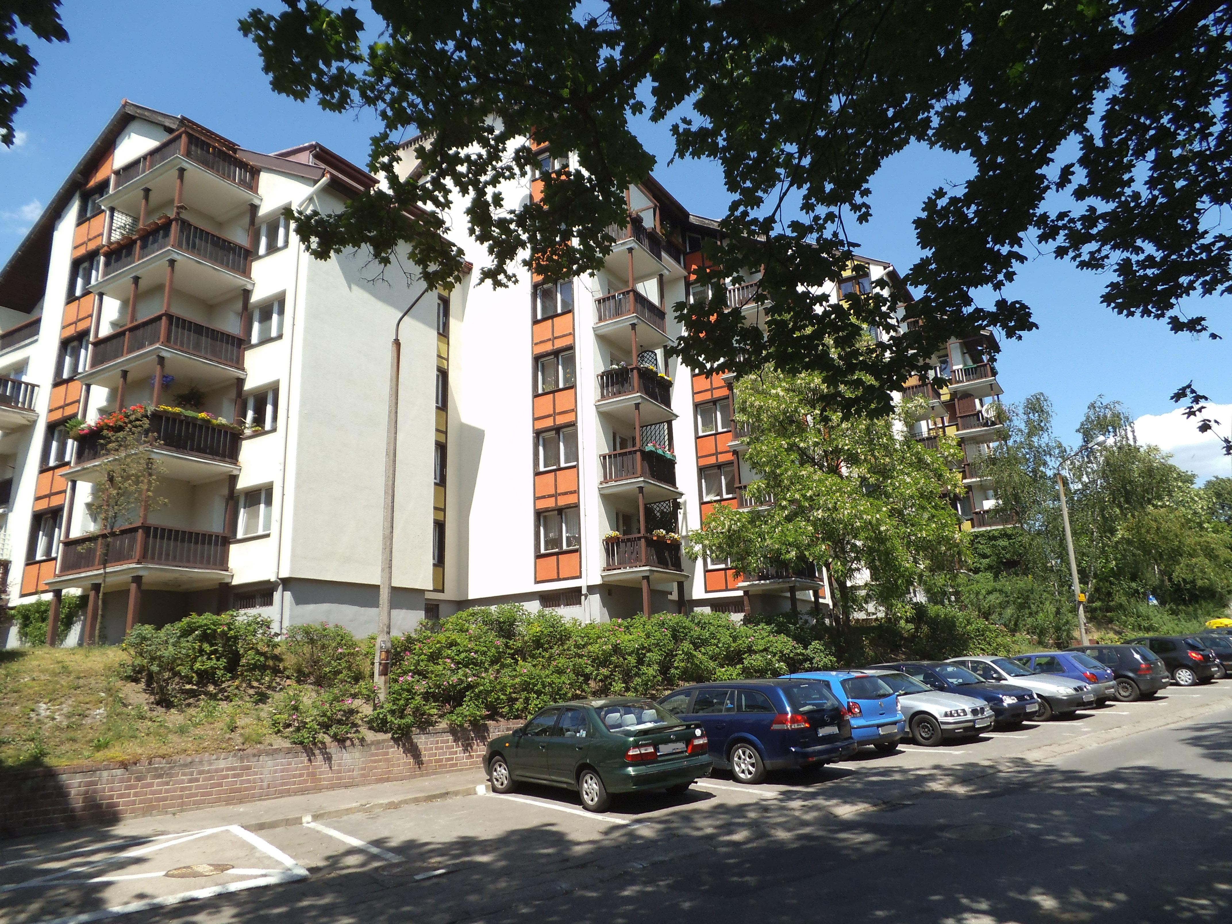 Fragment zabudowy wielorodzinnej przy ulicy Matejki